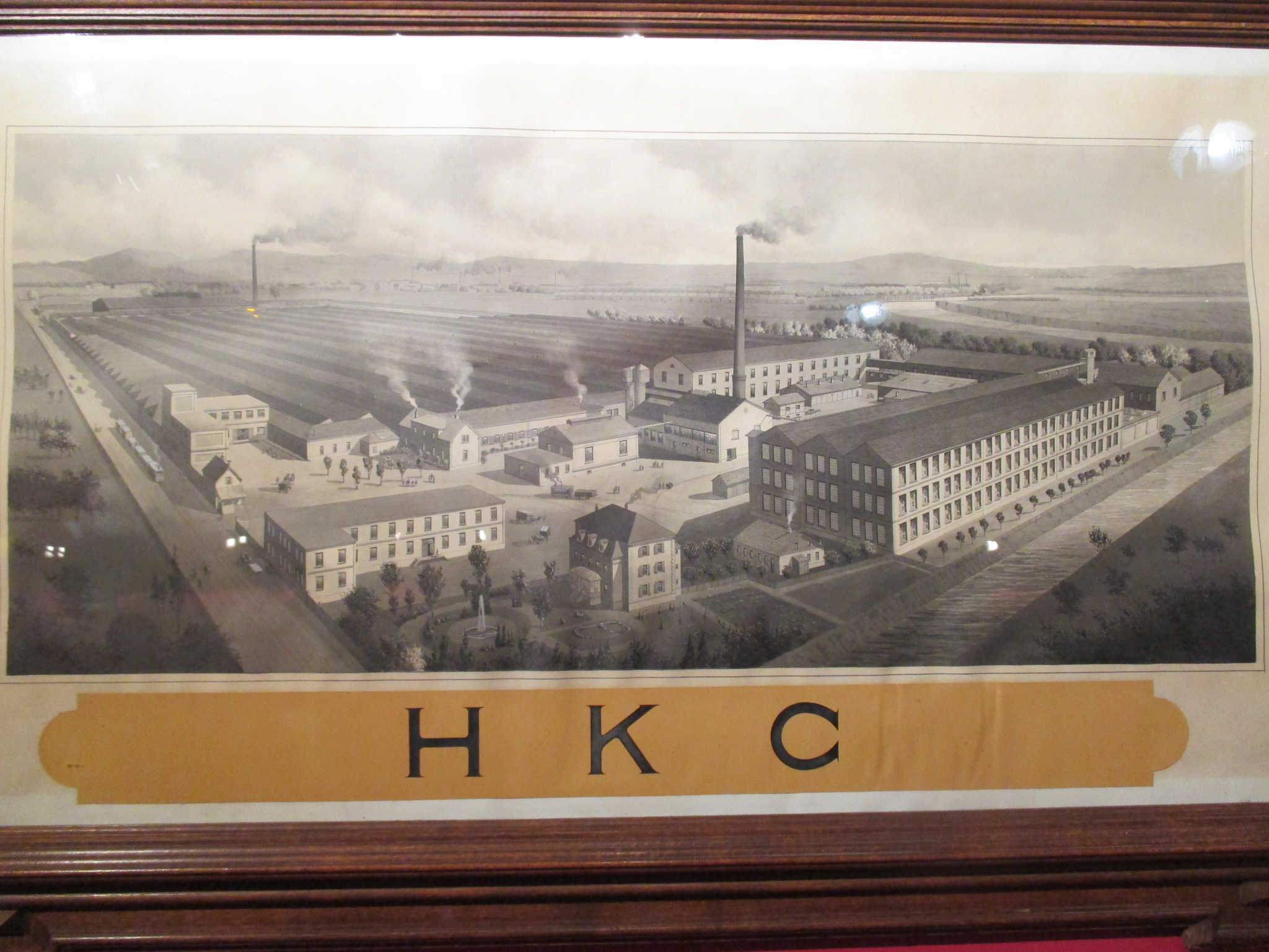 Industrie textile / ancienne filature de laine HKC achetée par les Frères Schlumpf en 1957 à Mulhouse. Actuel musée de l'automobile de Mulhouse